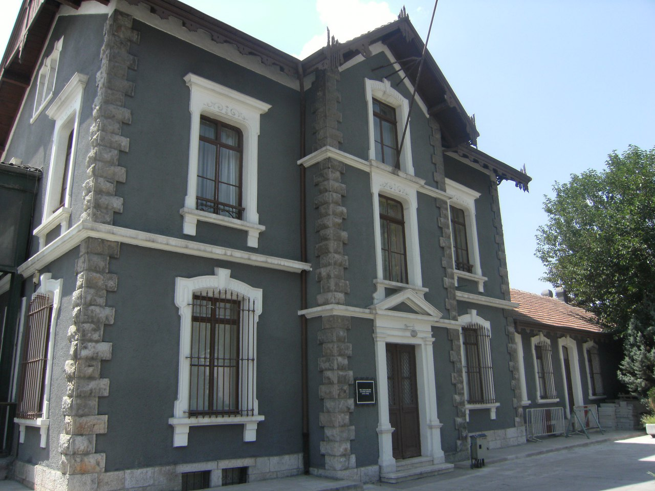 Milli Mücadelede Atatürk Konutu ve Demiryolları Müzesi